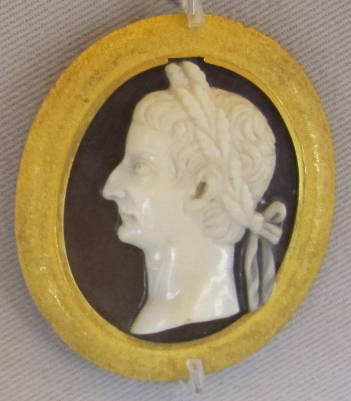 Glittica romana, tiberio, sardonice, I sec dc.